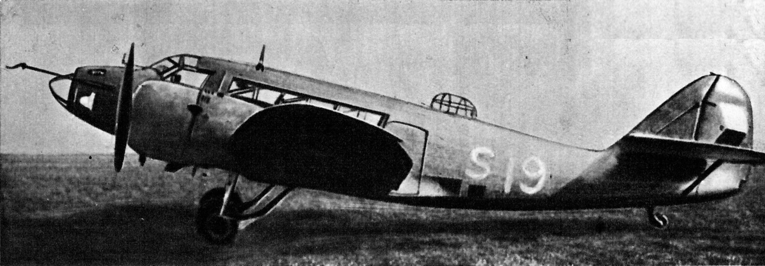 Czechosłowacki samolot rozpoznawczo-bombowy Aero A.304.